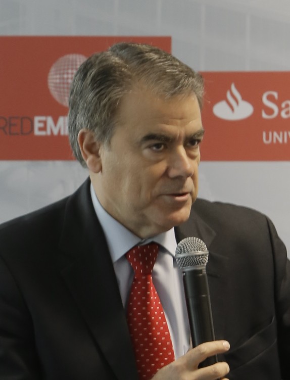 Participan: Federico Morán, Secretario General de Universidades del Ministerio de Educación, Cultura y Deporte; Senén Barro, Presidente de RedEmprendia; y Francisco Tirado, Vicerrector de Investigación de la Universidad Complutense de Madrid